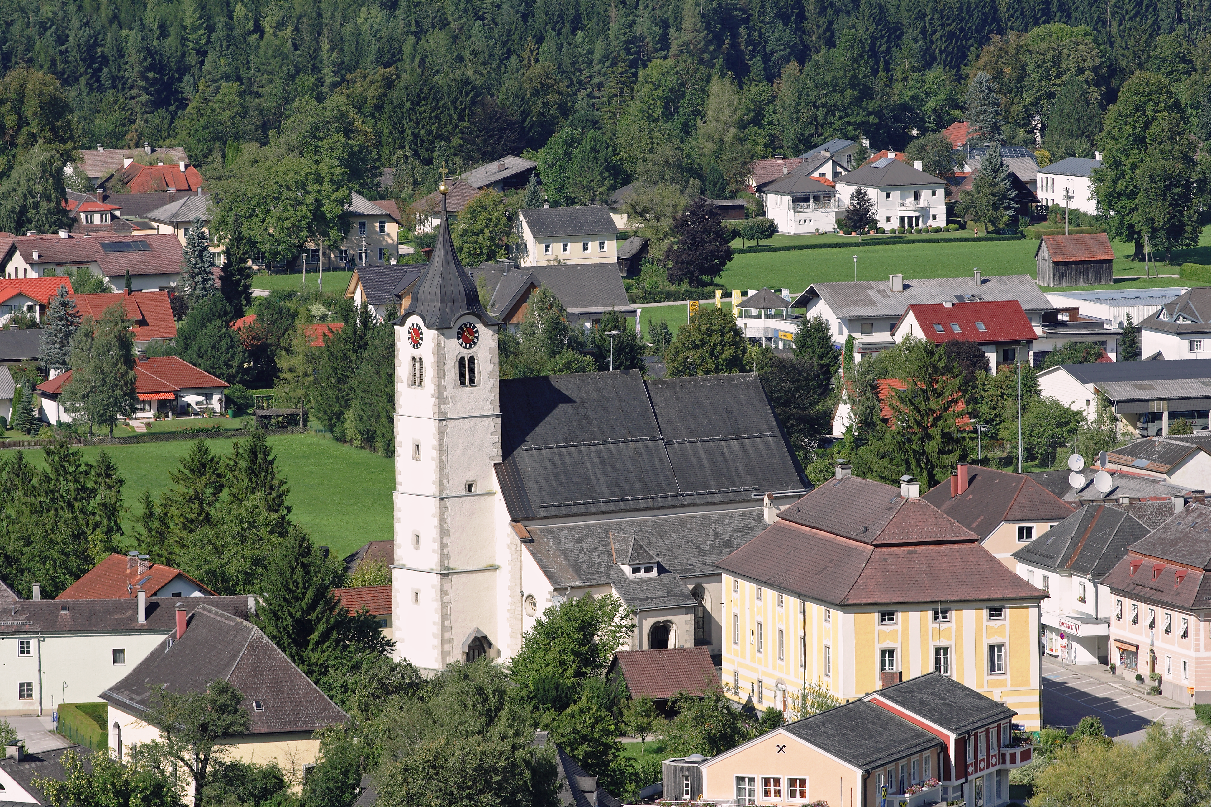 Pfarrkirche und Pfarrhof in Molln